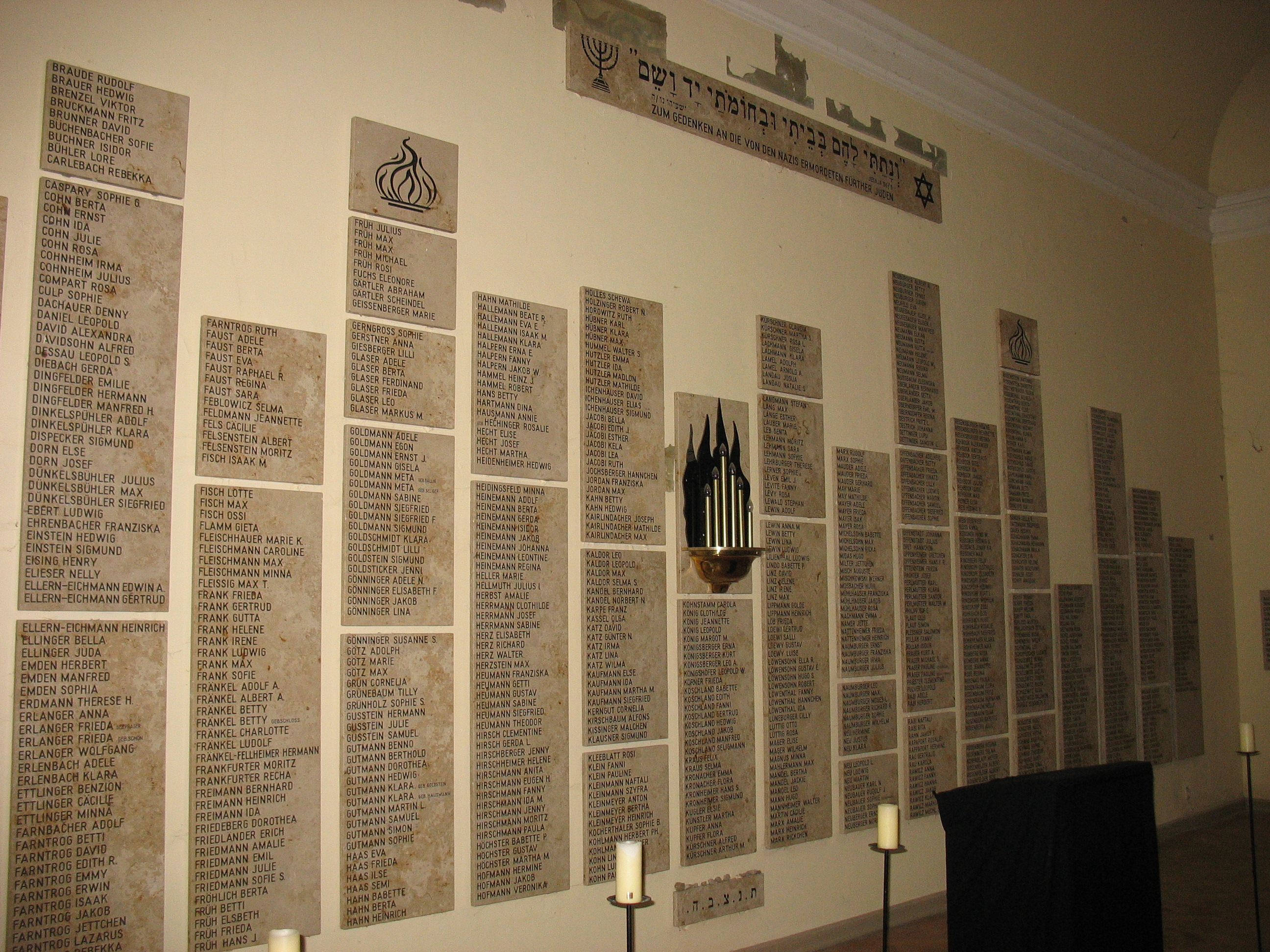 Gedenkstätte für die Fürther Shoa Opfer